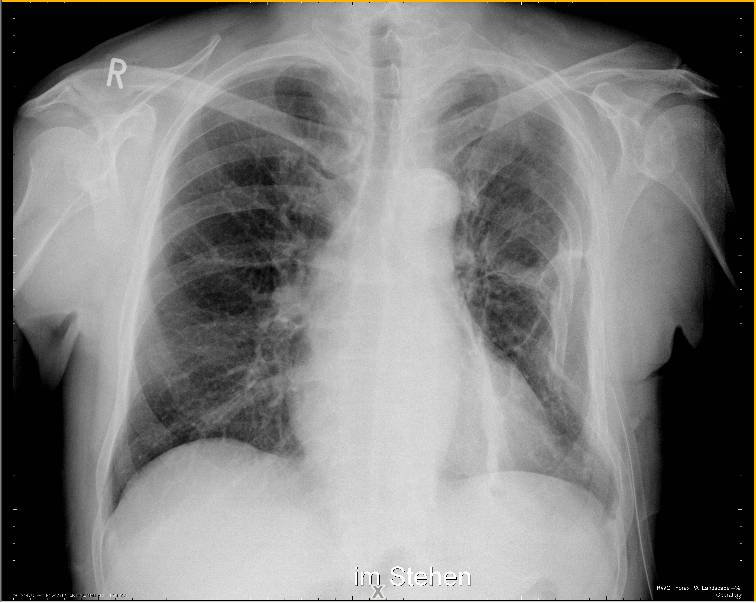 Röntgenbild Rippenserienfraktur links mit Beteiligung der 2. - 10. Rippe. Besonders auffällig sind die stark verschobenen (dislozierten) Frakturen der 5. - 7. Rippe